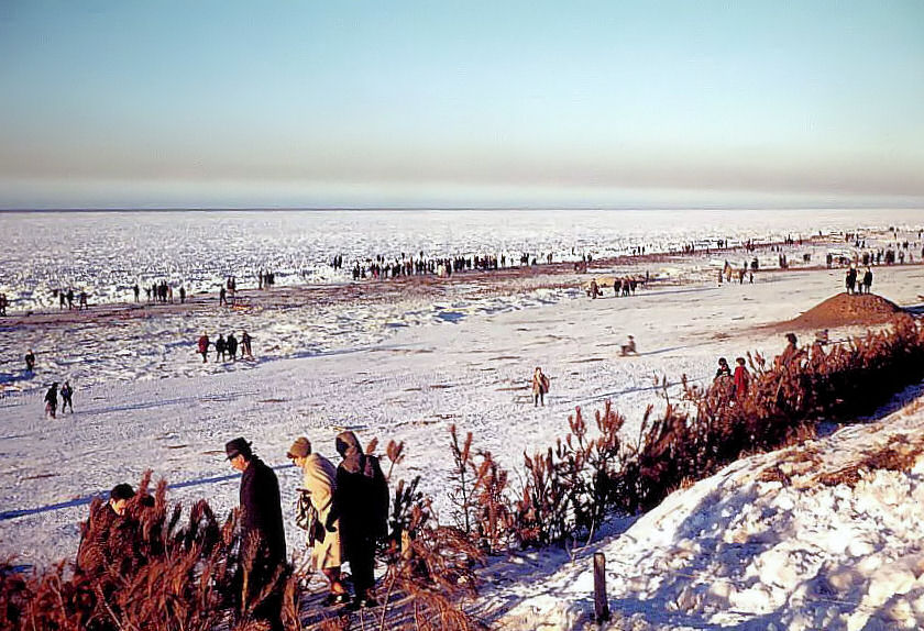 Noordzee, bevroren branding, winter 1963 1964 [or 1962 1963]